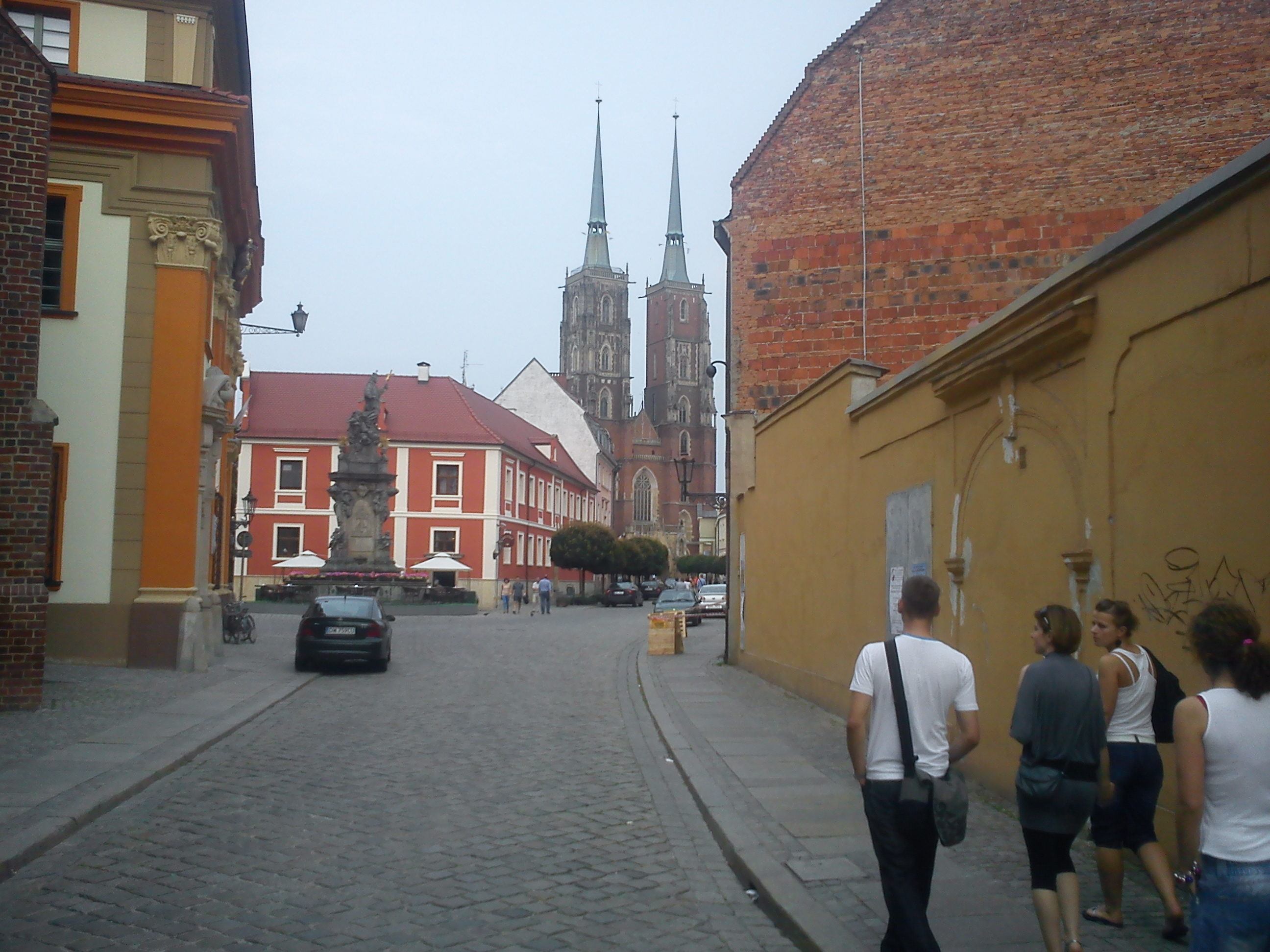 Katedra św. Jana Chrzciciela pl. Katedralny 1, Miasto Wrocław - Śródmieście